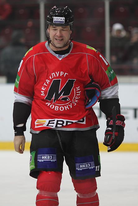 Нападающий новокузнецкого «Металлурга» Крис Саймон во время матча чемпионата КХЛ против ханты-мансийской «Югры» 5 января 2013 года.